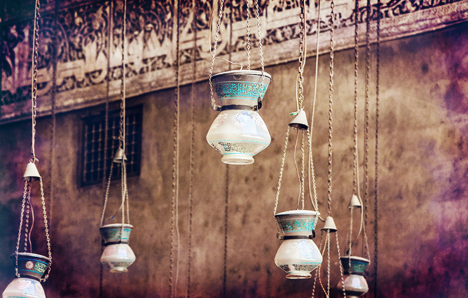 لقطة من داخل جامع السلطان حسن بالقاهرة يظهر فيها النجف الإسلامي المعروف بزخارفه و معلقاته بالسلاسل النحاسية المدلاة من السقف د